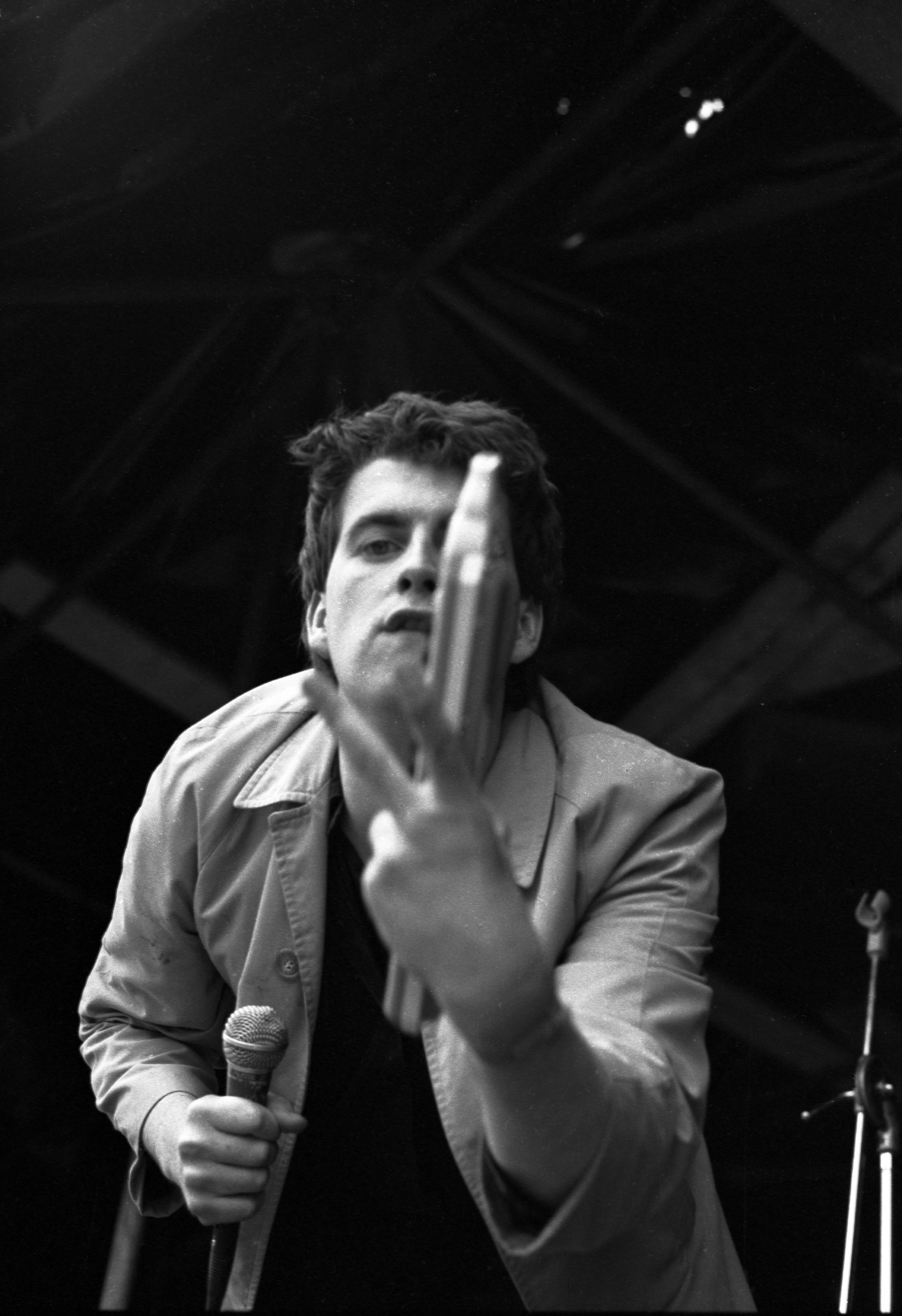 Llun o David R Edwards mewn gig yn Pesda Roc, Bethesda, 1985